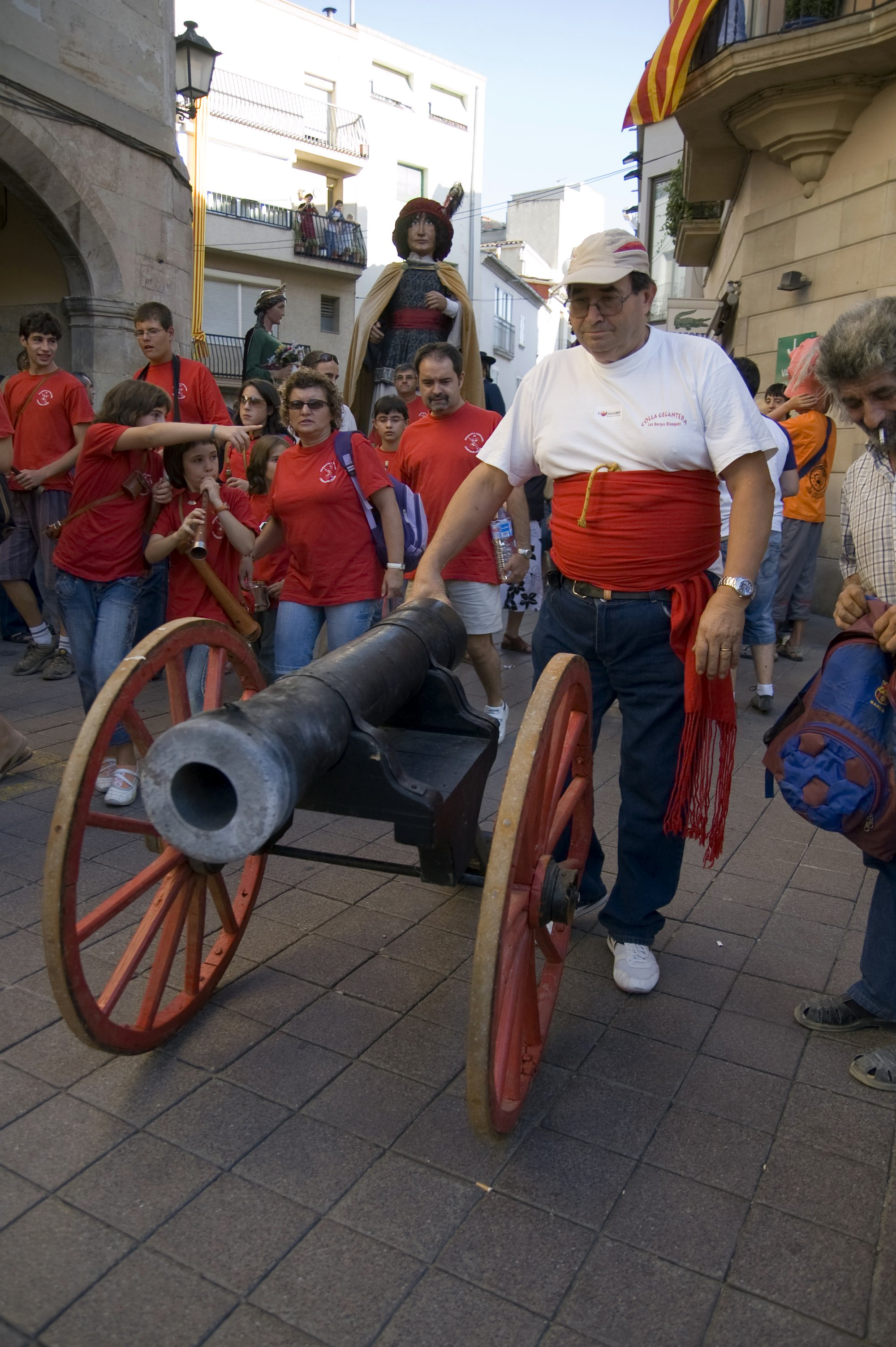 Canó del Saló i grallers a la Festa Major de Les Borges Blanques, la capital de la comarca de les Garrigues, (Catalunya). Aquest es l'anomenat "Canó del Saló", propietat de l'Ajuntament de les Borges Blanques. Surt al carrer per festa major o altres festes excepcionals per fer soroll, i es posen traques a l'interior. Probablement de l'època de la Guerra del Francès.